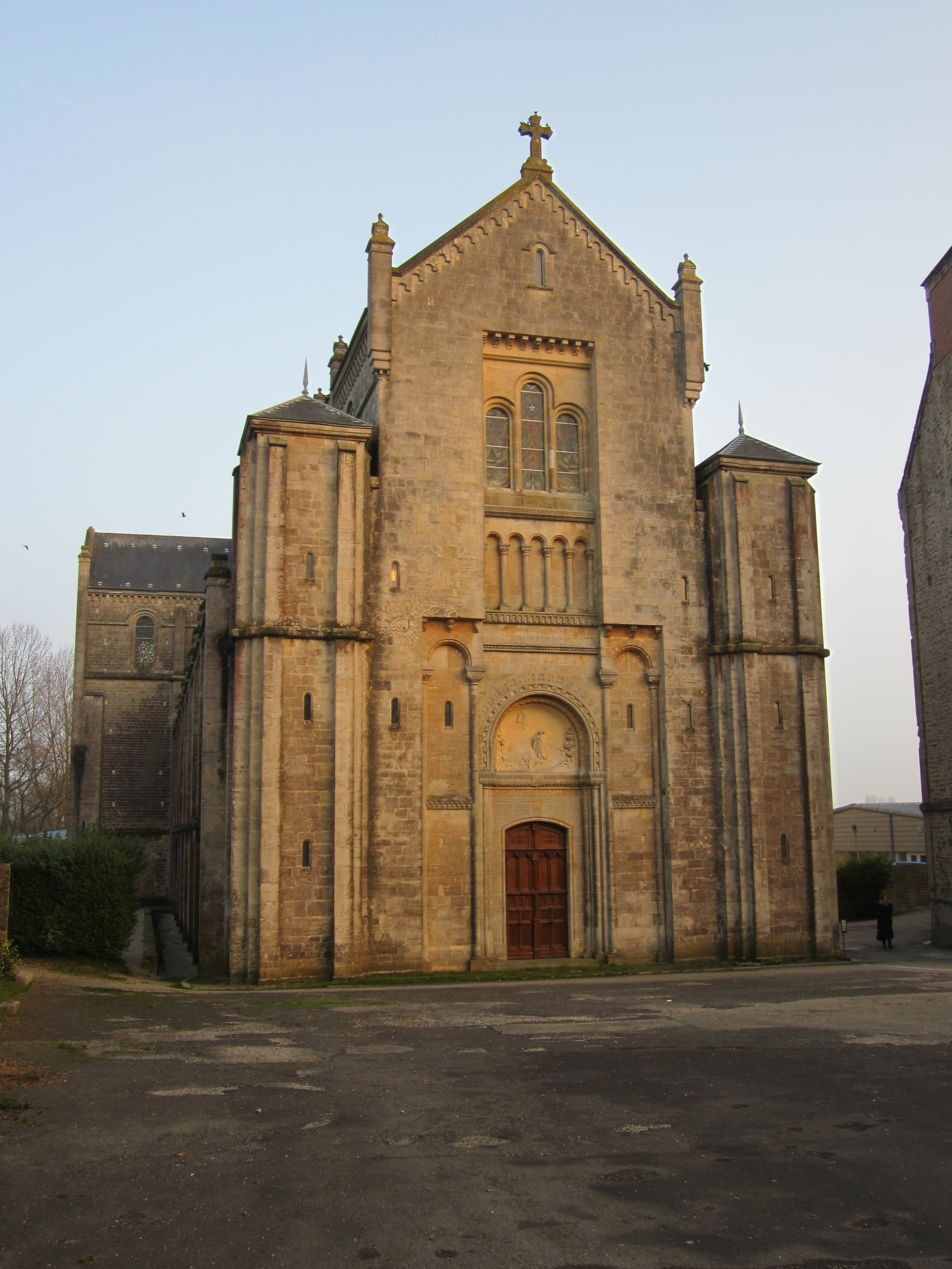 Abbaye de Montebourg